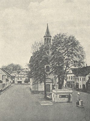 Již zaniklý kostel Čtrnácti sv. pomocníků v Nýrsku.